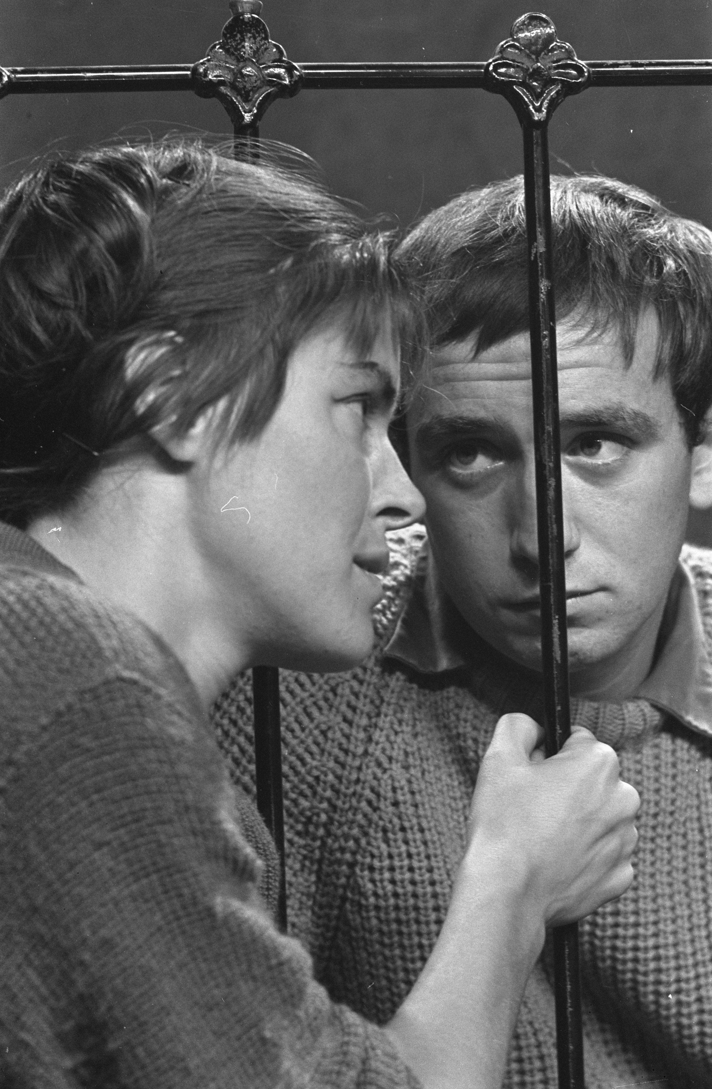 Collectie / Archief : Fotocollectie Anefo Reportage / Serie : [ onbekend ] Beschrijving : Televisiespel "Een bruid in de morgen" van Hugo Claus, Ina van Faassen en Hans Croiset Datum : 30 september 1959 Trefwoorden : acteurs, actrices, televisie, televisiespellen, toneel Persoonsnaam : Croiset, Hans, Faassen, Ina van Fotograaf : Pot, Harry / Anefo Auteursrechthebbende : Nationaal Archief Materiaalsoort : Negatief (zwart/wit) Nummer archiefinventaris : bekijk toegang 2.24.01.05 Bestanddeelnummer : 910-7150